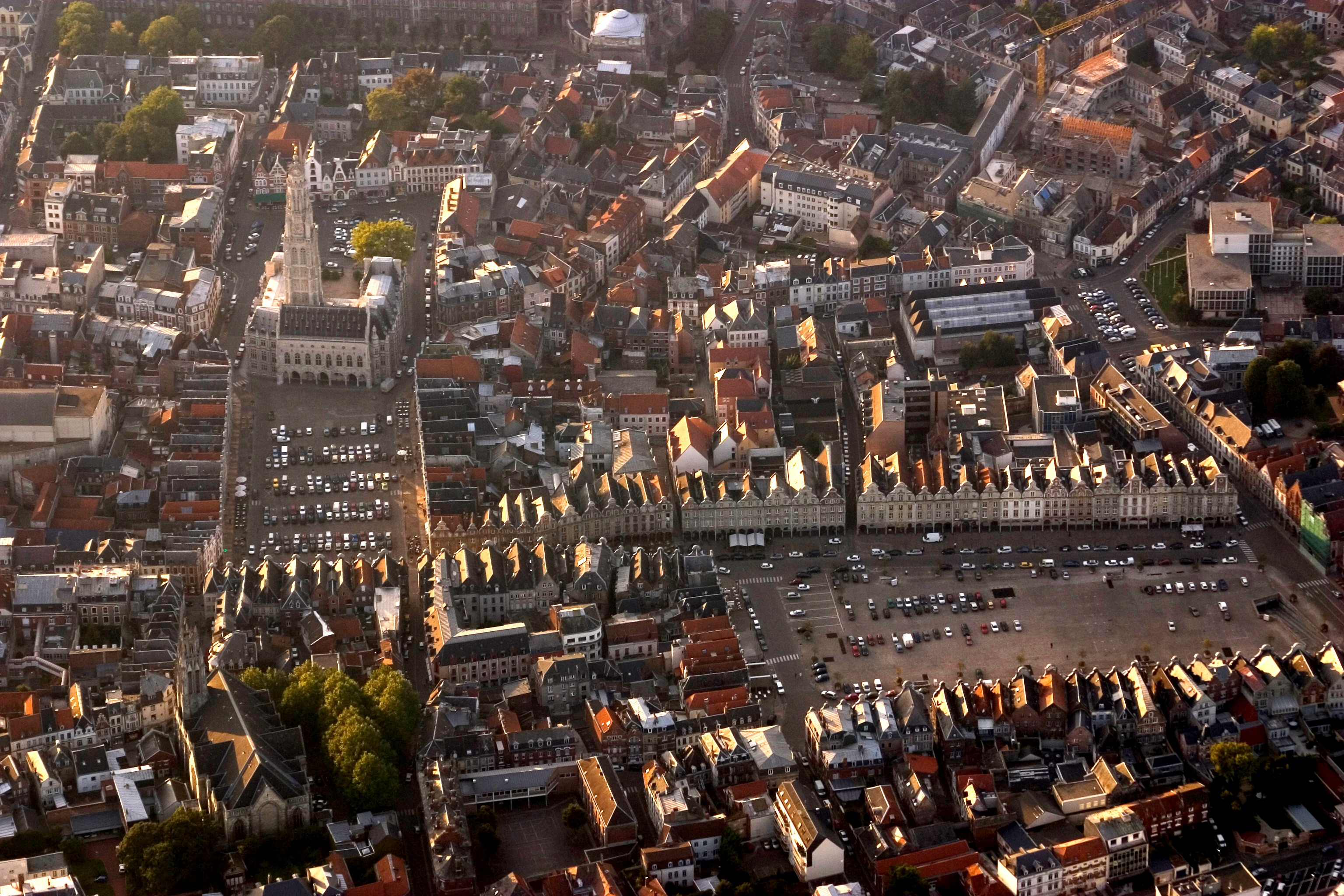 photo personnelle